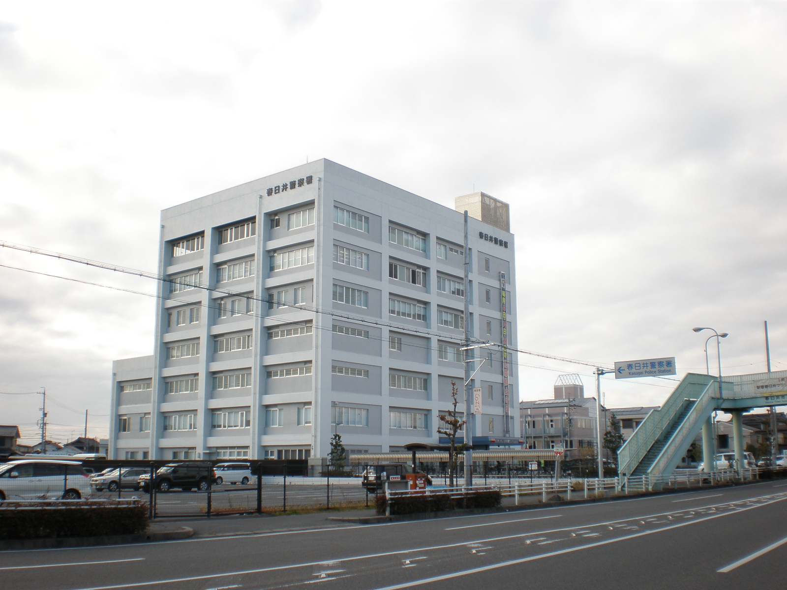 春日井警察署